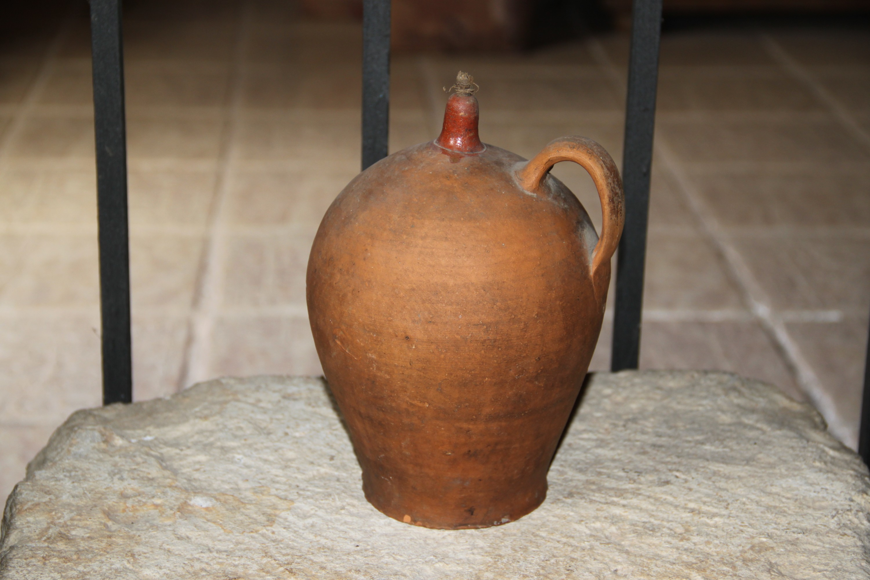 Trabajo propio. Foto tomada en el museo de las Bodegas Valcabado, Cubillas de Santa Marta (Valladolid). La pieza alfarera es una "botijilla" de la primera mitad del siglo XX. Probable origen: Arrabal del Portillo (Valladolid).